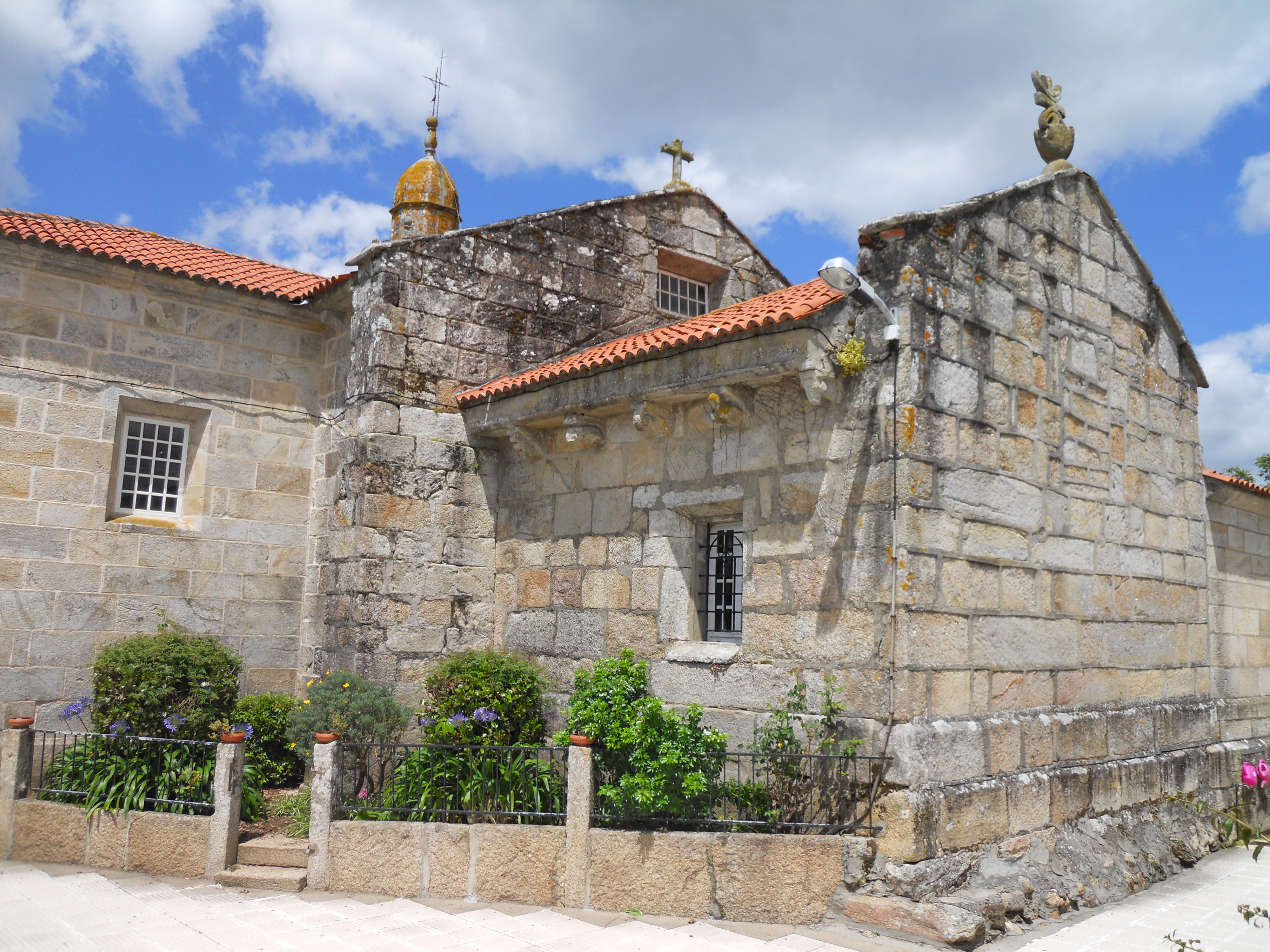 Cabecera de la iglesia.